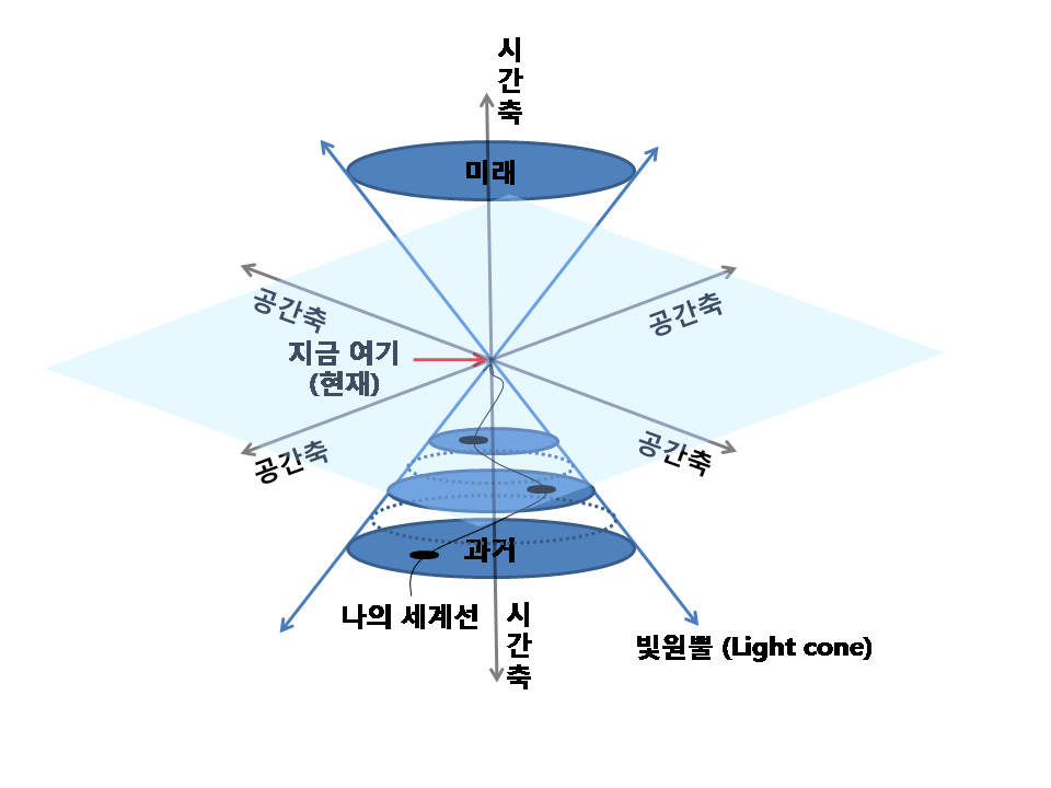 빛원뿔의 그림입니다.